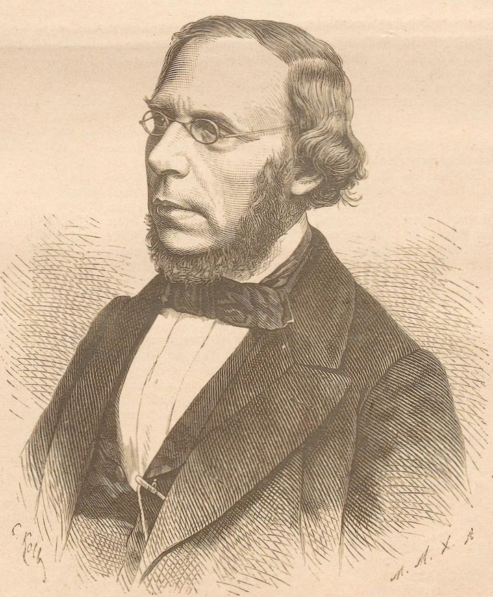 Hermann Masius. In: Illustriertes Unterhaltungs-Blatt: wöchentliche Beilage zum Darmstädter Tagblatt. Darmstadt, 1886